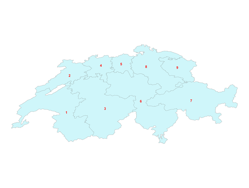 Postleitzahlen Schweiz 1stellig